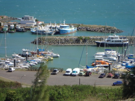 Marina de Pandope